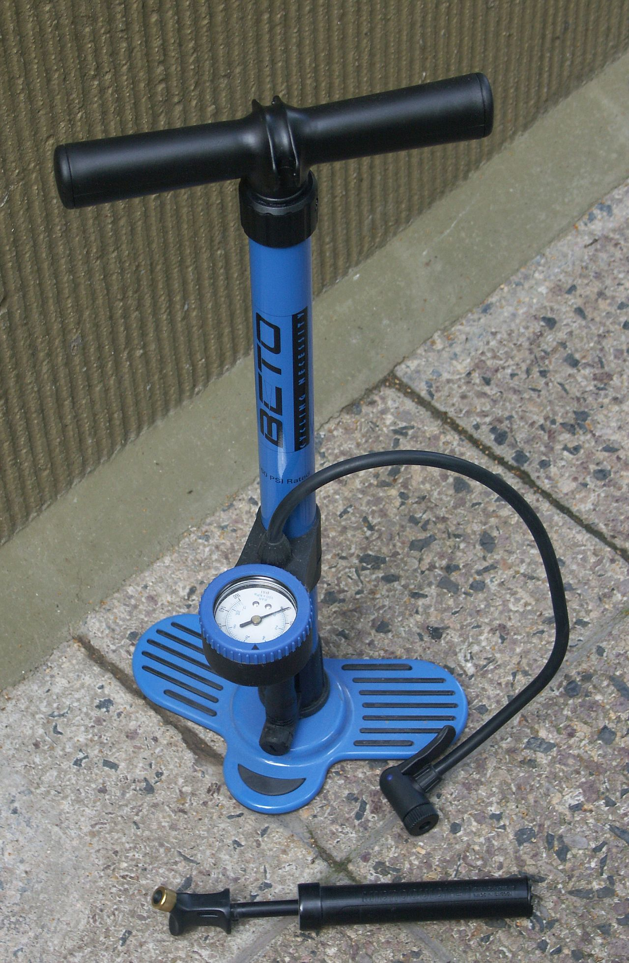 Unten: Doppelhubhandpumpe, oben: Standpumpe für Fahrradschläuche